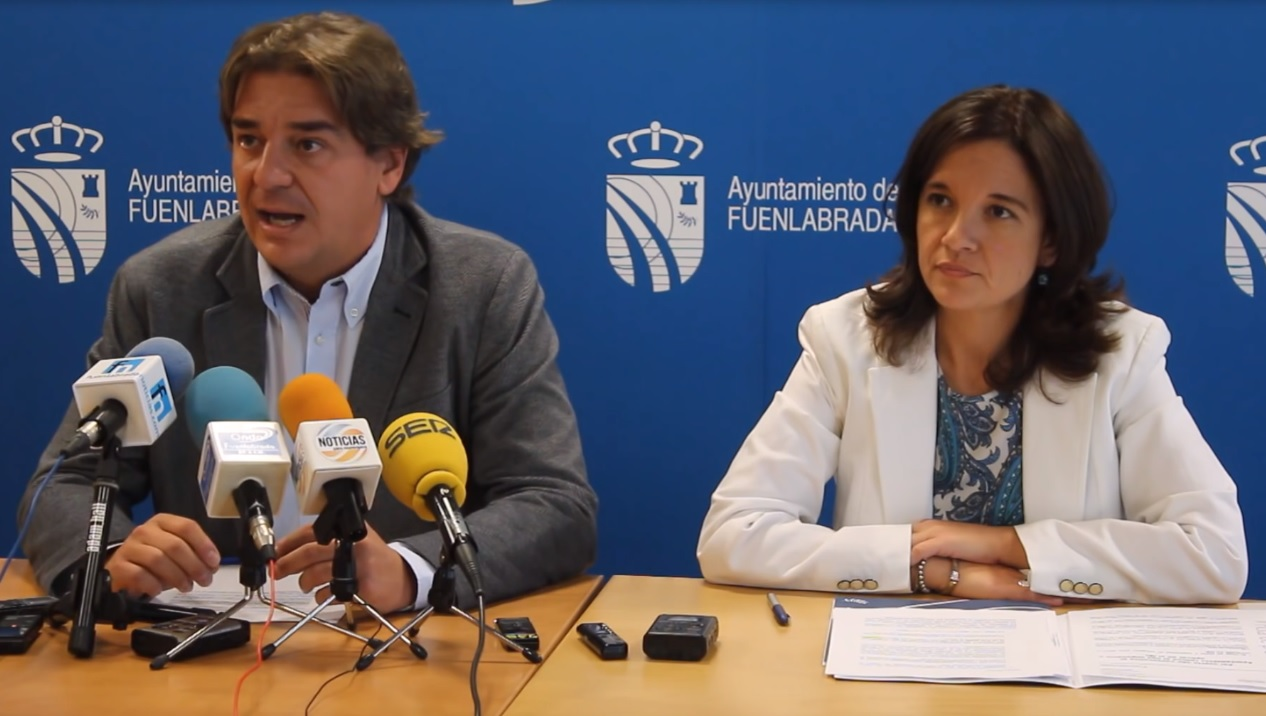 El Primer Teniente de Alcalde, Javier Ayala, junto a la Concejala de Hacienda, Raquel López, han avanzado en rueda de prensa celebrada este viernes, el esfuerzo fiscal que realiza el Gobierno local a favor del contribuyente. Esfuerzo que implica que las arcas municipales dejarán de percibir cerca de dos millones de euros.